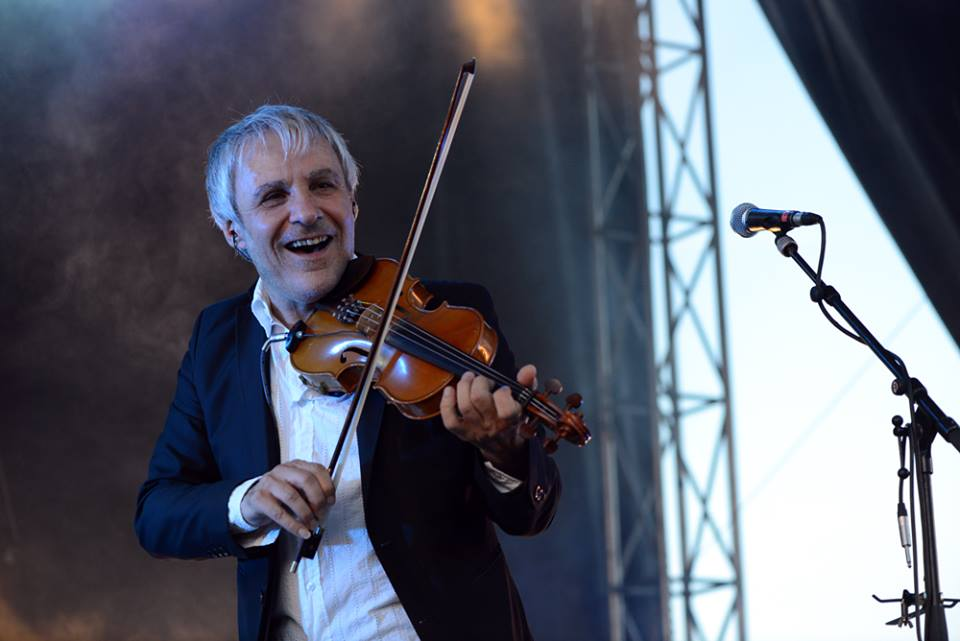 Pierre Sangra au violon